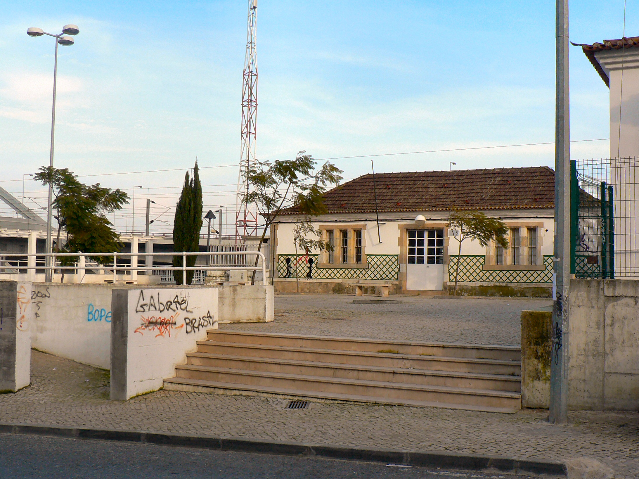 Estação dos Caminhos de Ferro de Sacavém